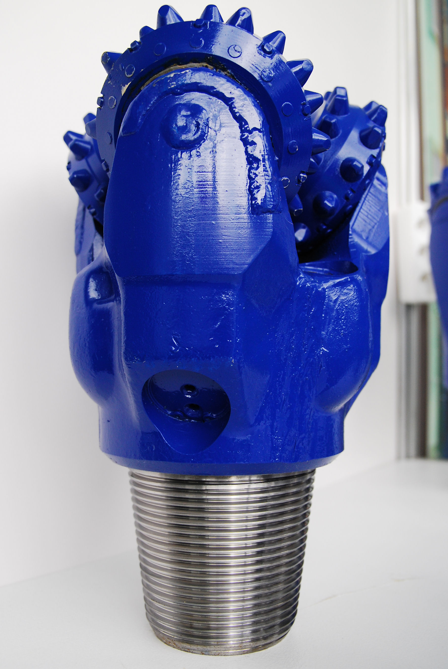 Urządzenie górnicze zdjęcie wykonane podczas Międzynarodowych Targów Górnictwa, Przemysłu Energetycznego i Hutniczego w Katowicach w Spodku